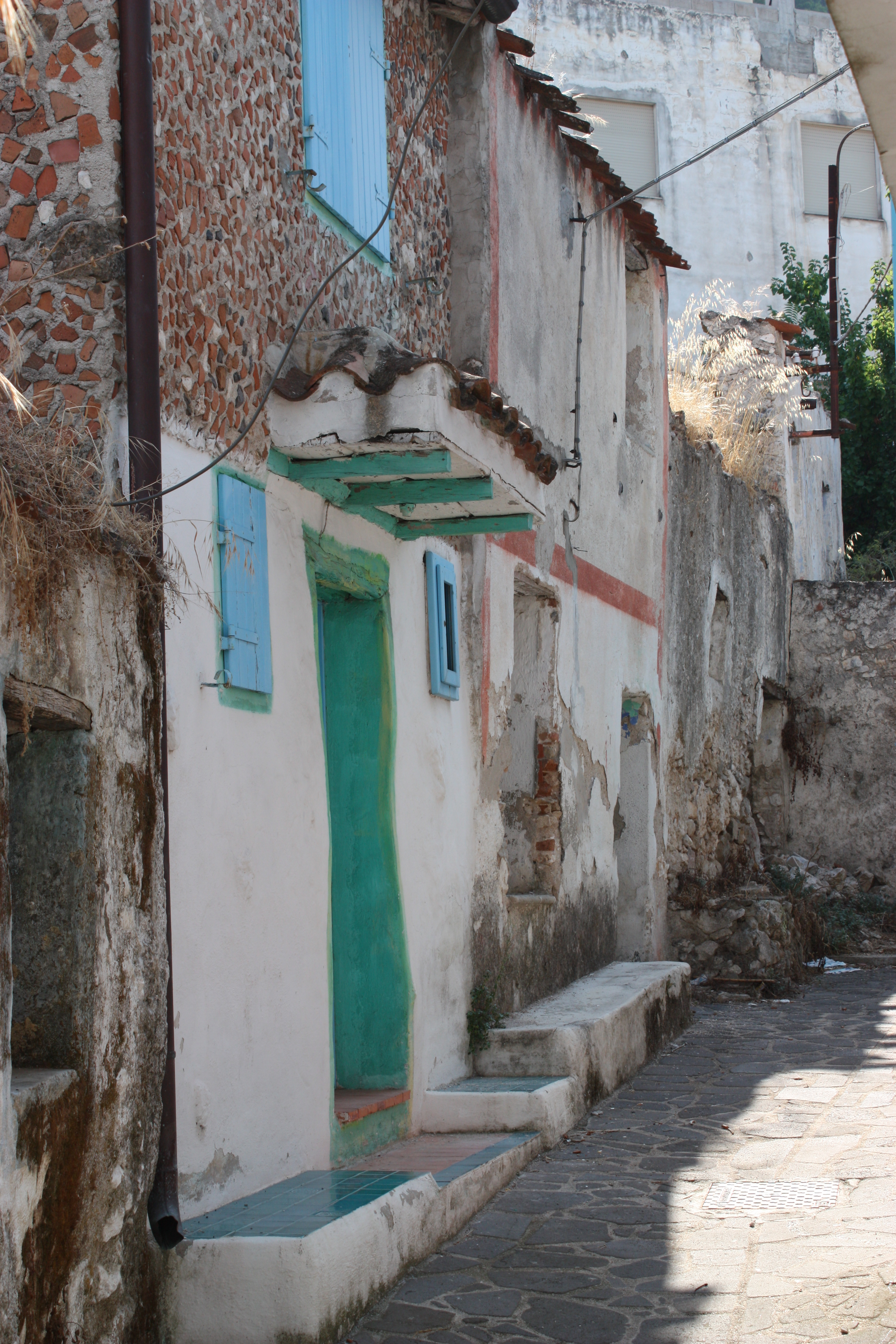 Sa Chejedda (bovore, "opera propria", sa Chejedda, EDP)